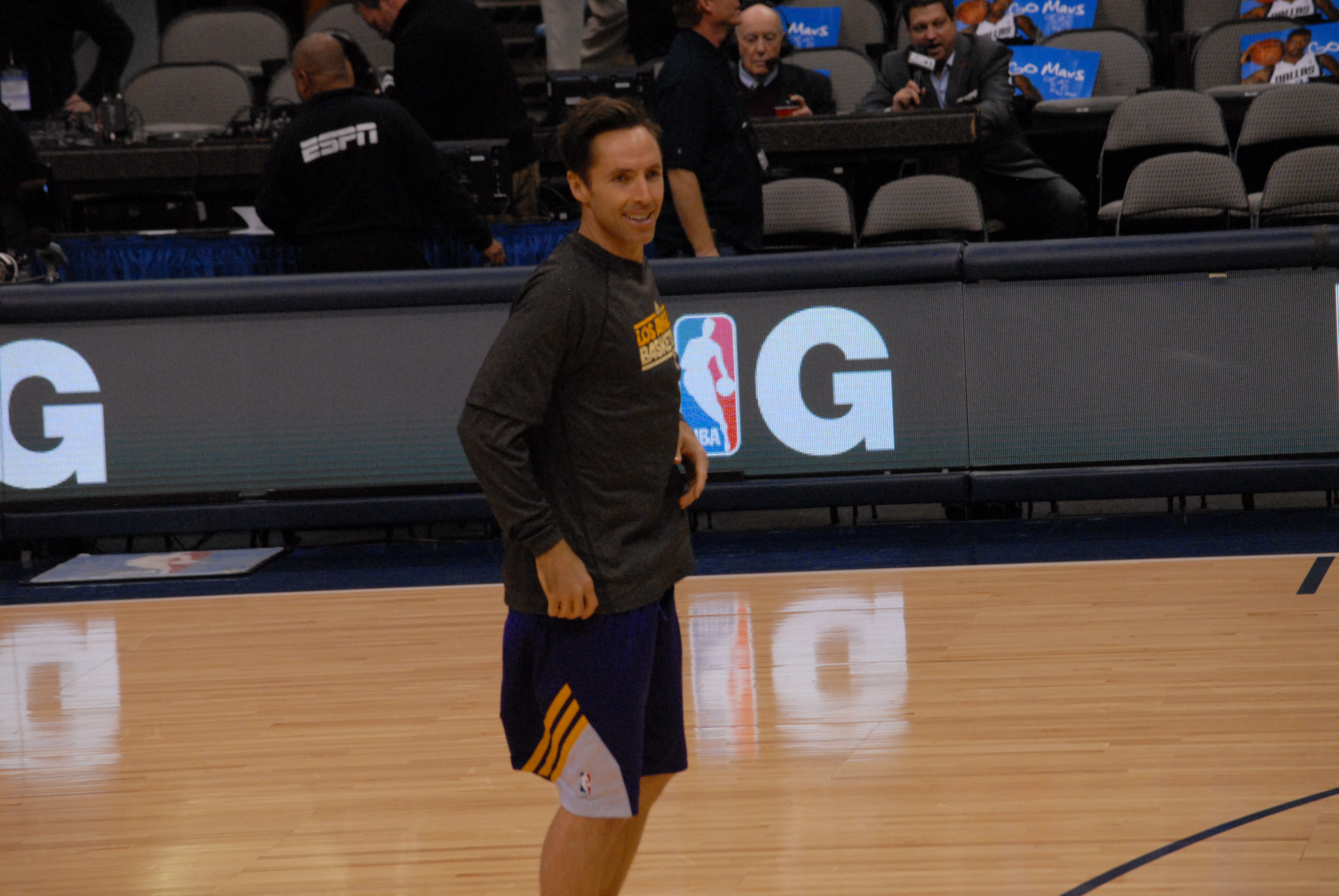 basketball,nba,2/24/2013 Steve Nash